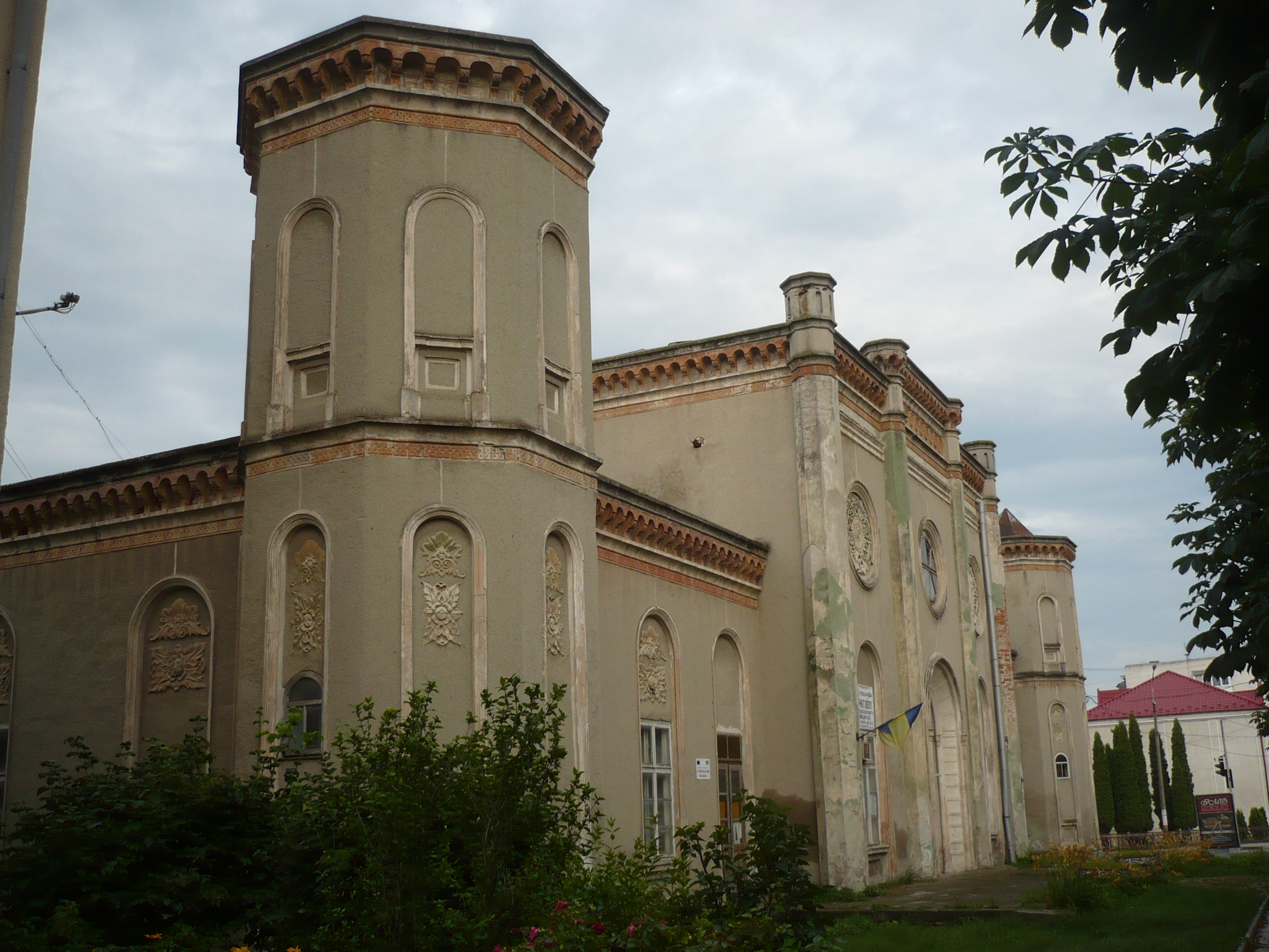 Czortków. Synagoga